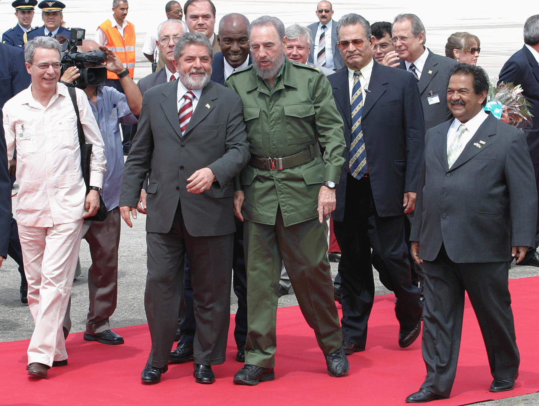 O líder cubano Fidel Castro e Lula em revista às tropas.